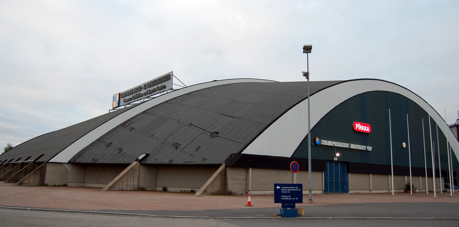 Pirkkahalli, virallisemmin Tampereen Messu- ja urheilukeskuksen A-halli.